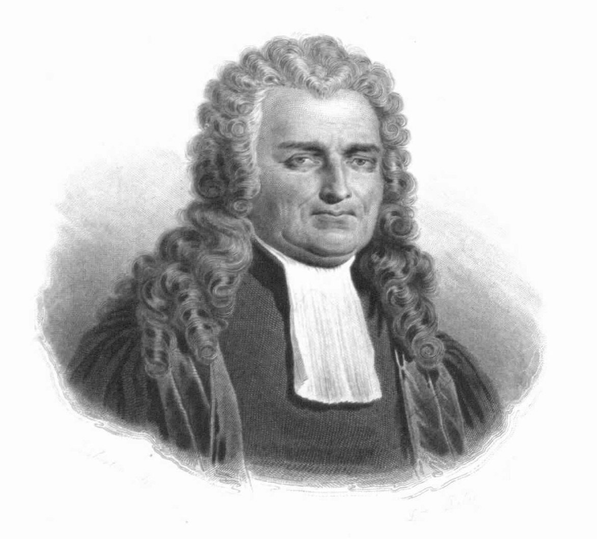 Jean-Baptiste de Montyon (1733-1820)